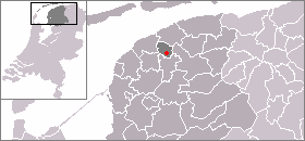 Kaart met de locatie van Cornjum, gemaakt uit sjabloon van Wikipedia-gebruiker Mtcv